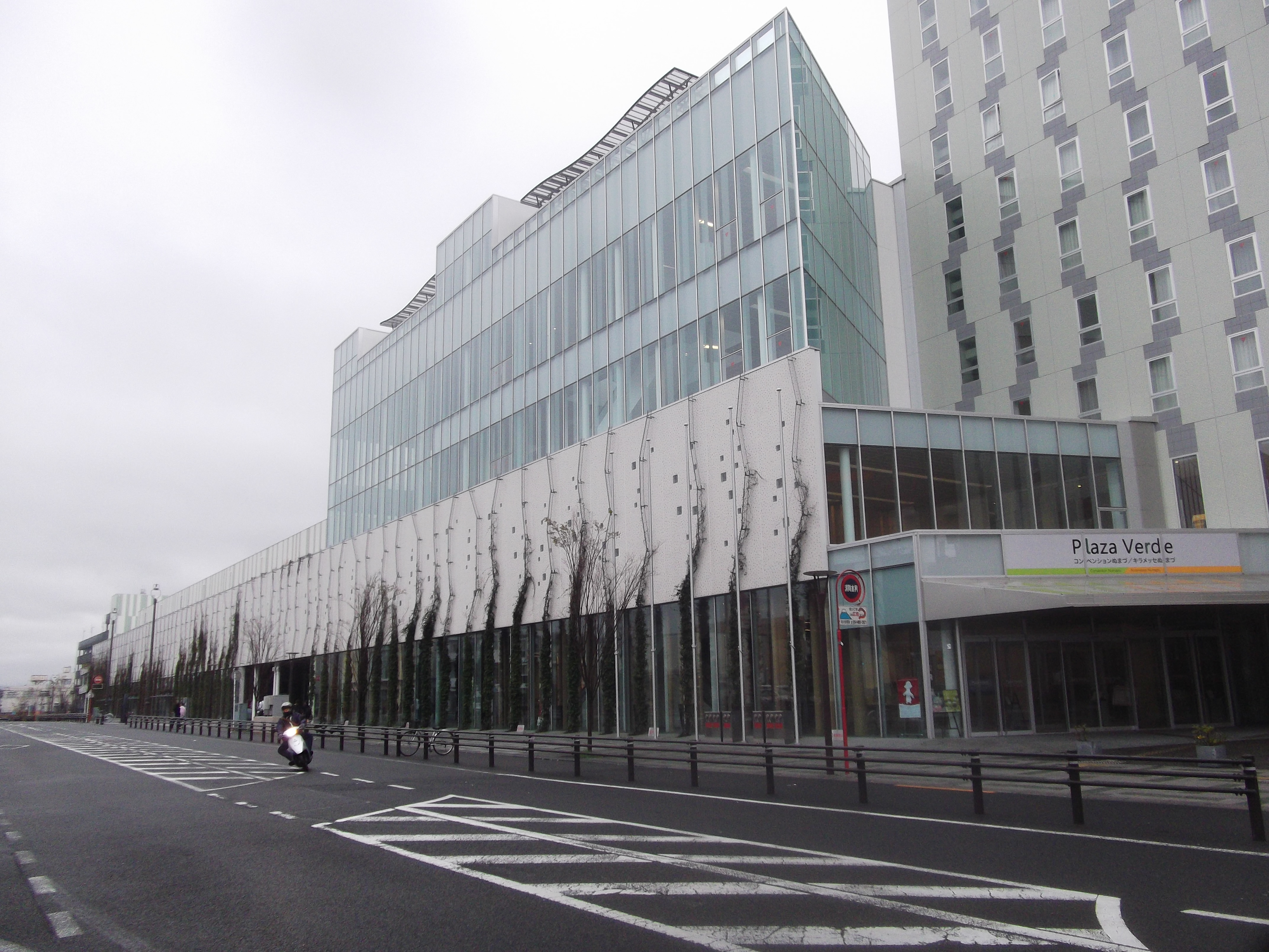 静岡県沼津市、ふじのくに千本松フォーラム（プラサヴェルデ）